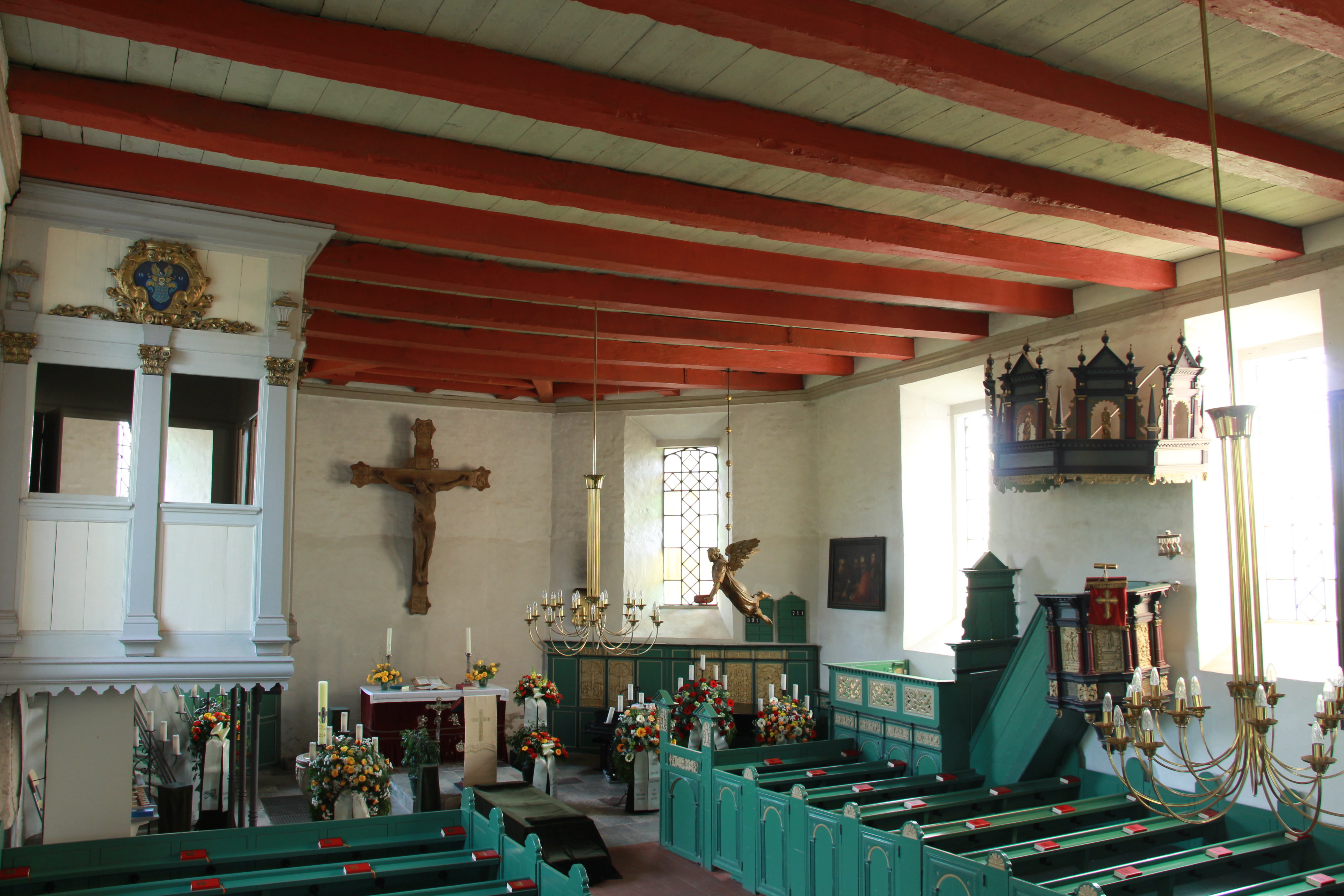 Innenraum der Kirchbarkauer Kirche This is a photograph of an architectural monument.